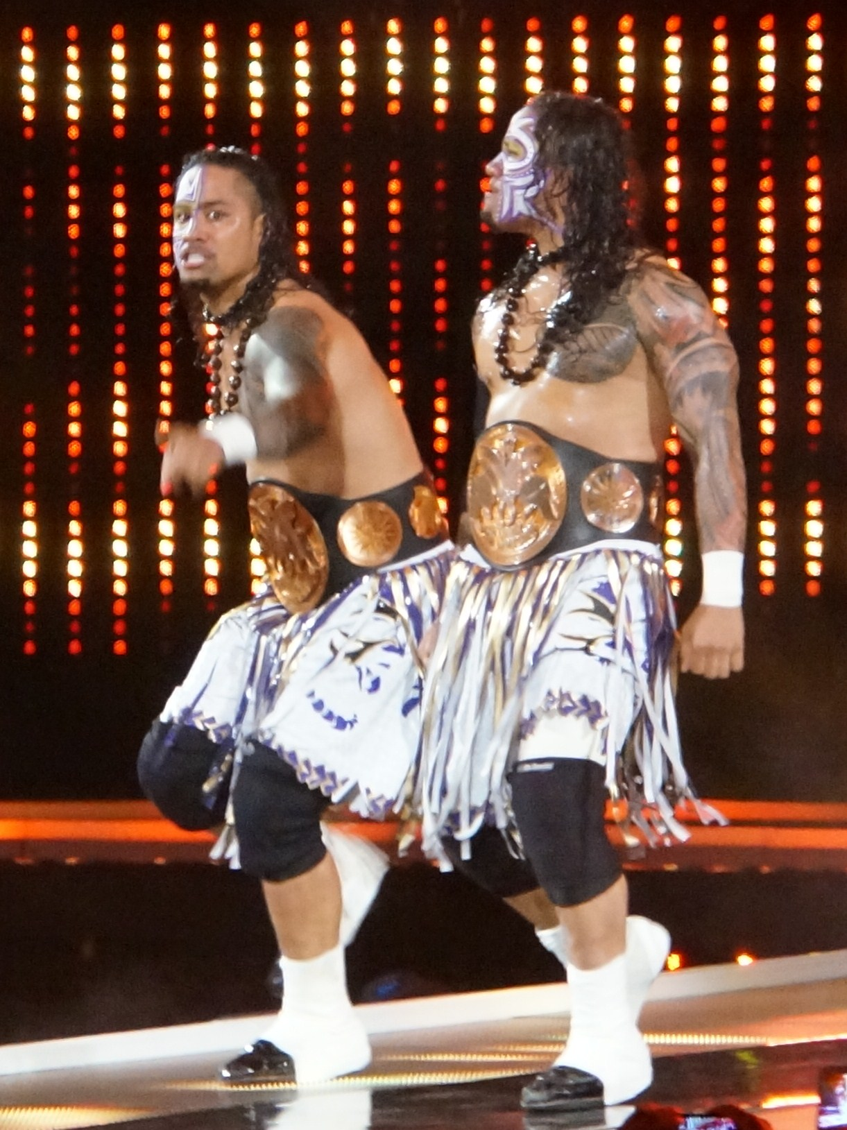 2014-04-06_17-31-22_NEX-6_DSC09229